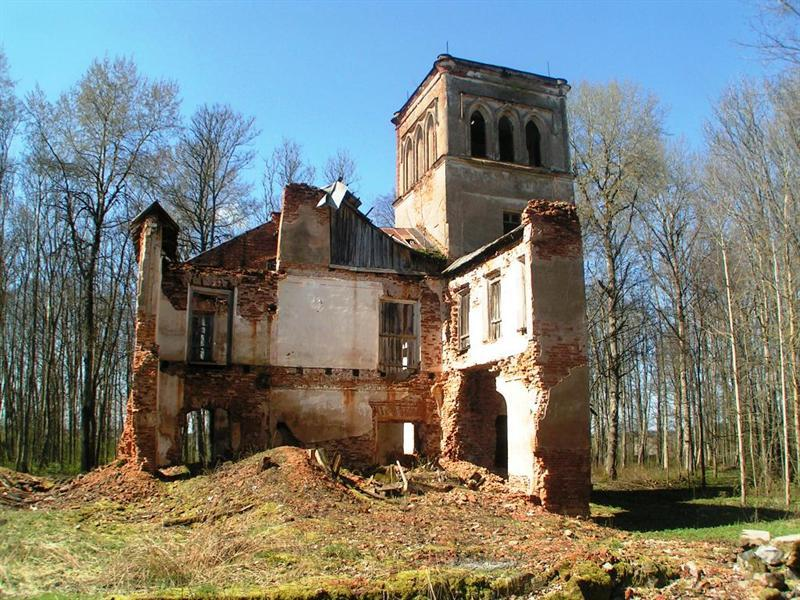 Svėdasų dvaro griuvėsiai. 2008 m.